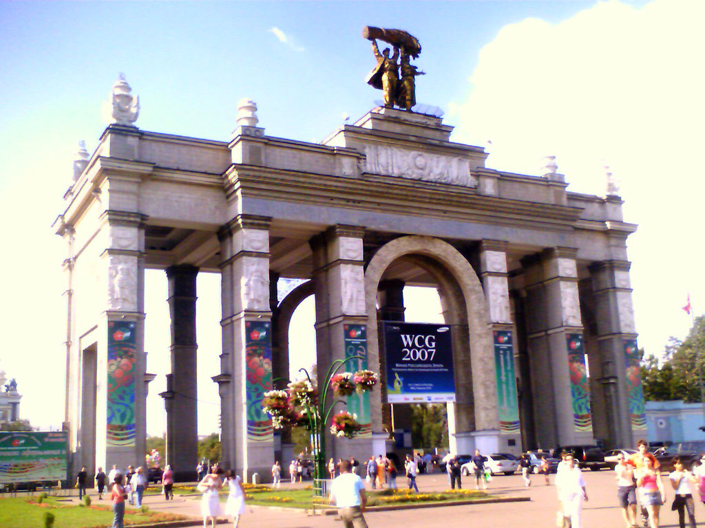 ВДНХ (ВВЦ), Москва. Арка Главного входа. Архитектор И. Мельчаков, 1953 год.